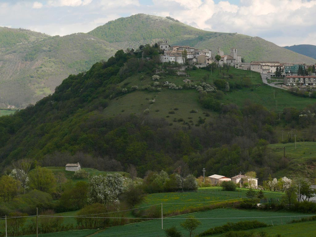 Monteleone di Spoleto, view